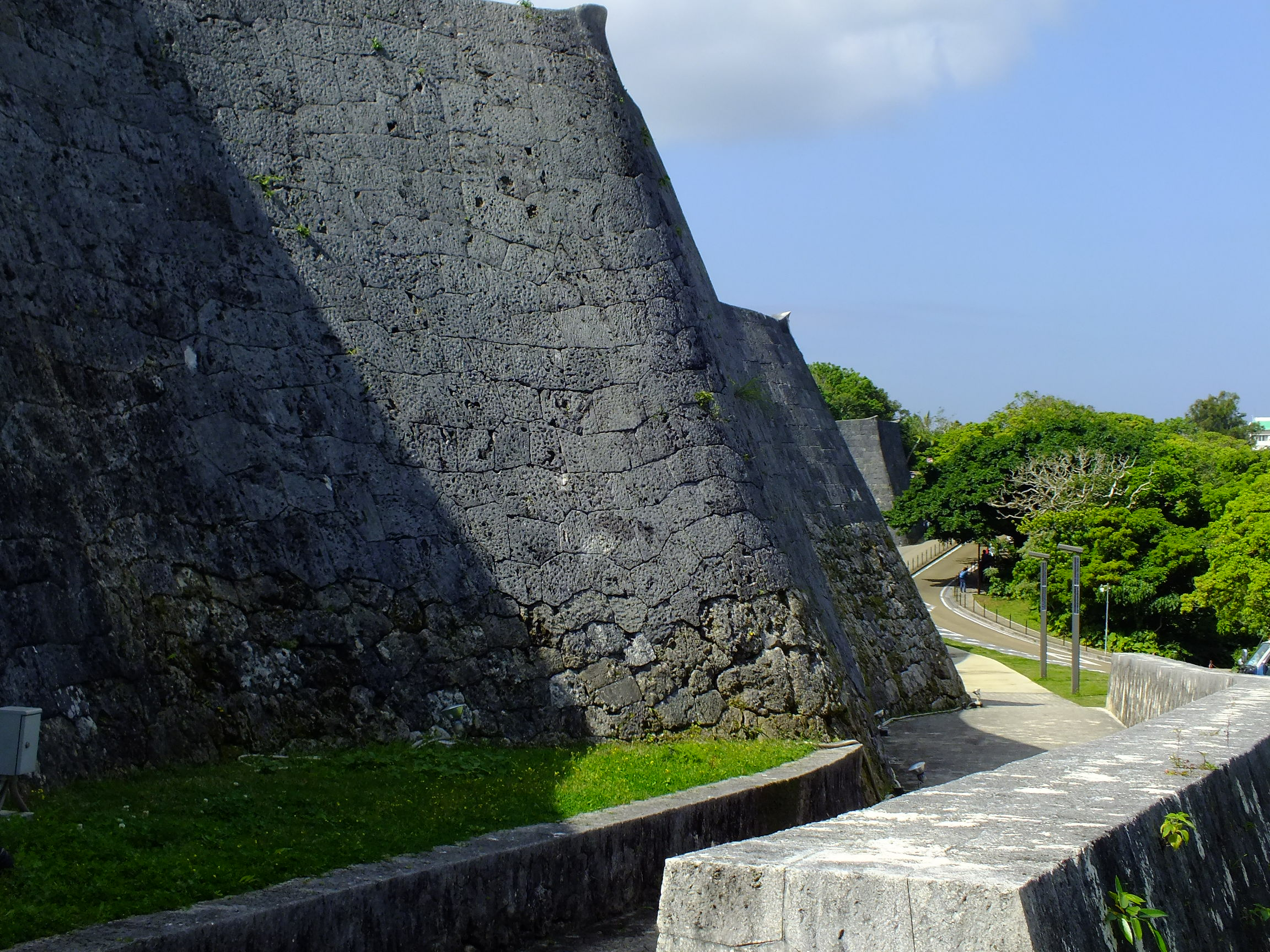 2014-02-28 Shuri Castle,Naha,Okinawa 首里城（沖縄県那覇市）